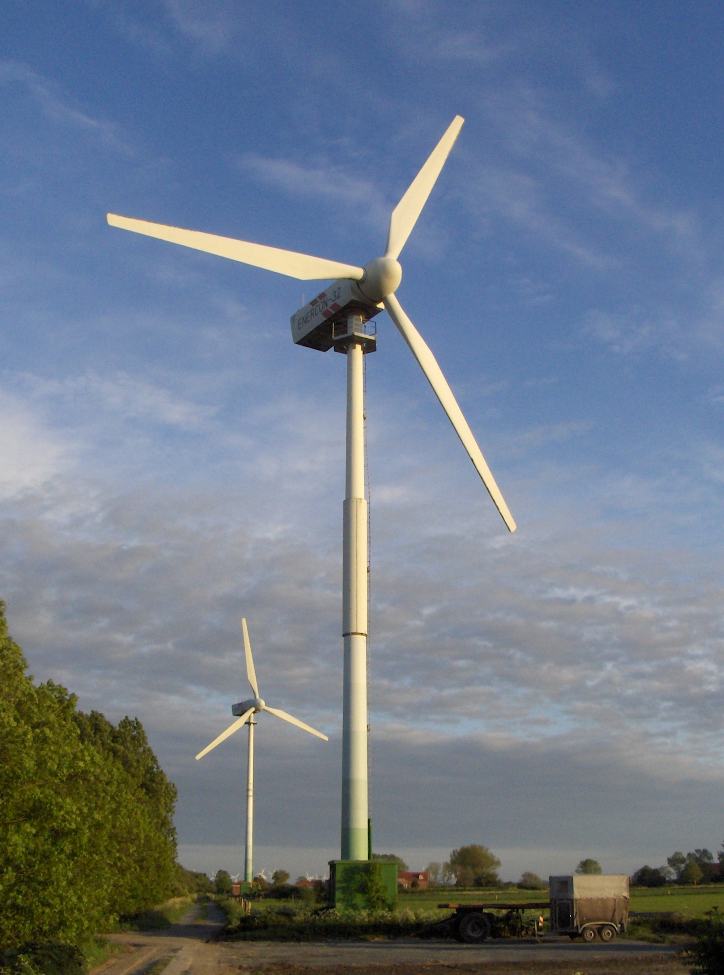 Enercon E-32 Windenergieanlage an der Nordseeküste